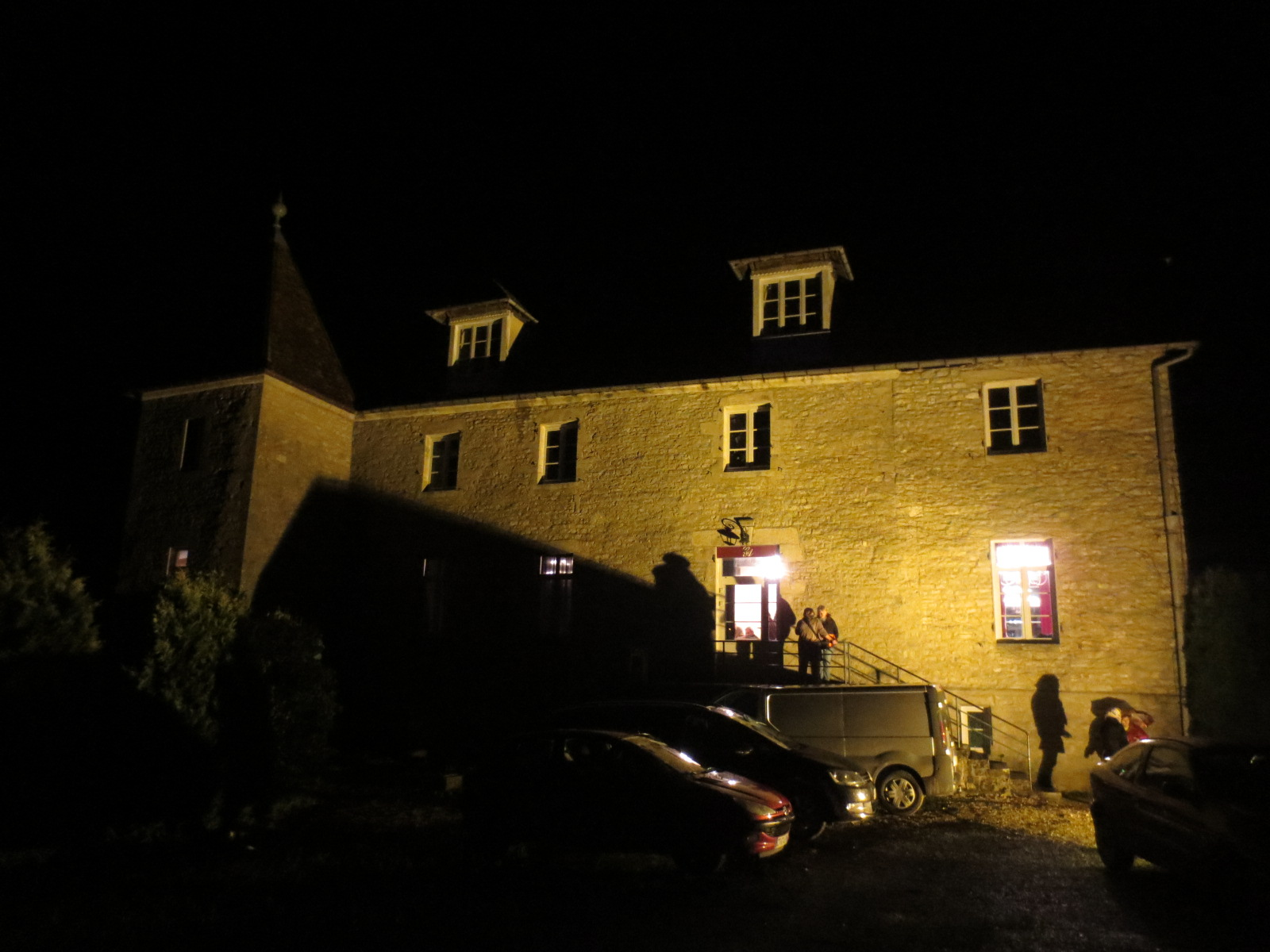 Château de La Châtelaine